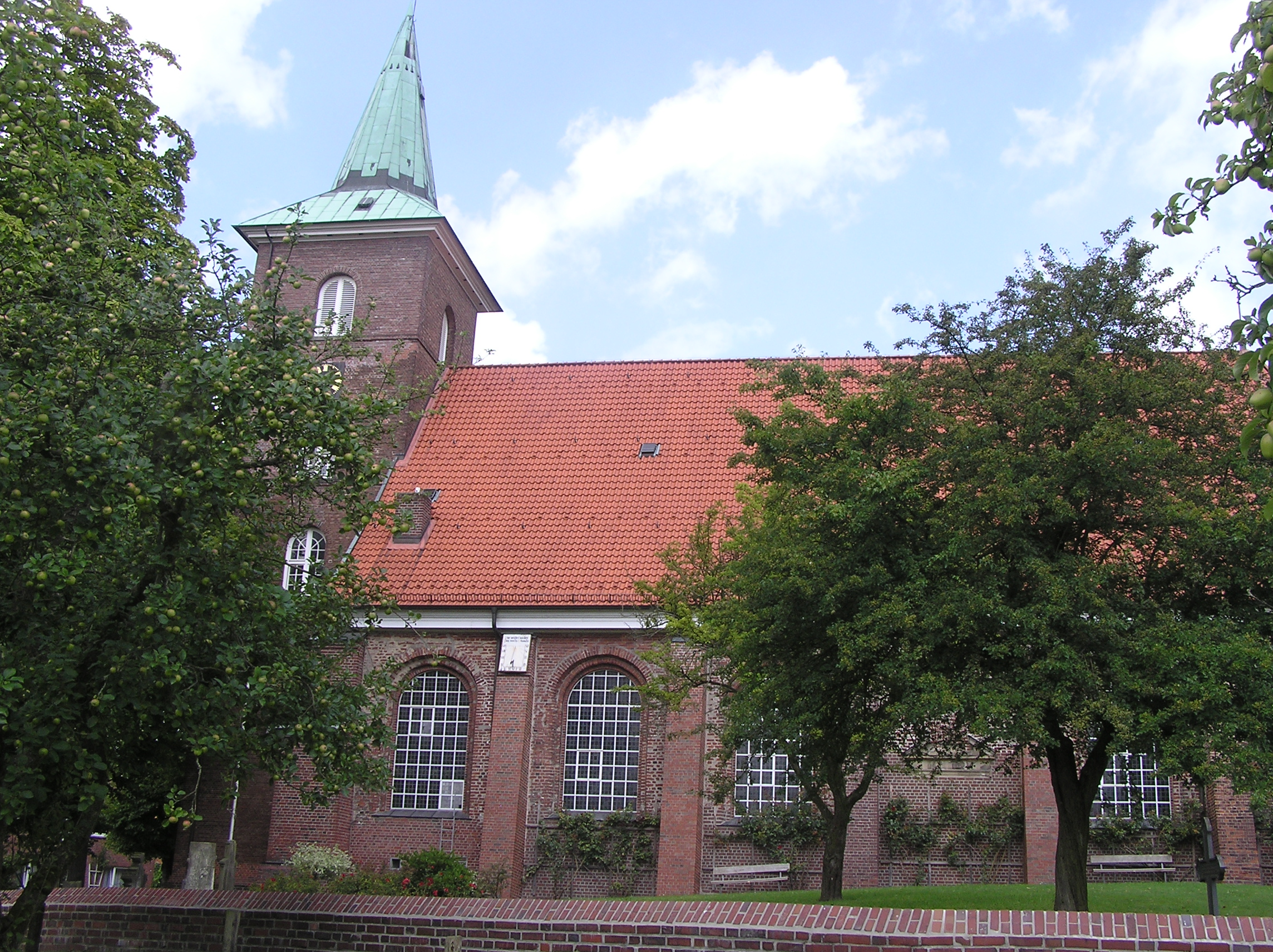 St. Pankratius, Neuenfelde This is the photograph of an architectural monument. It is part of the list of cultural monuments of Hamburg, no. 200